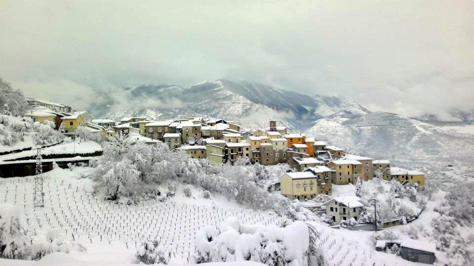 Campoli del Monte Taburno innevato